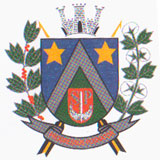 Brasão de armas de Álvares de Carvalho - SP.